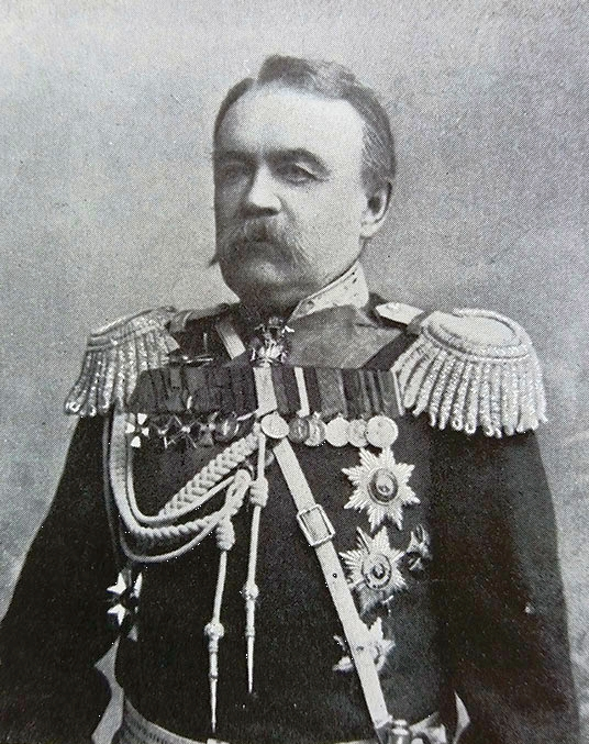 Столетов_Николай_Григорьевич